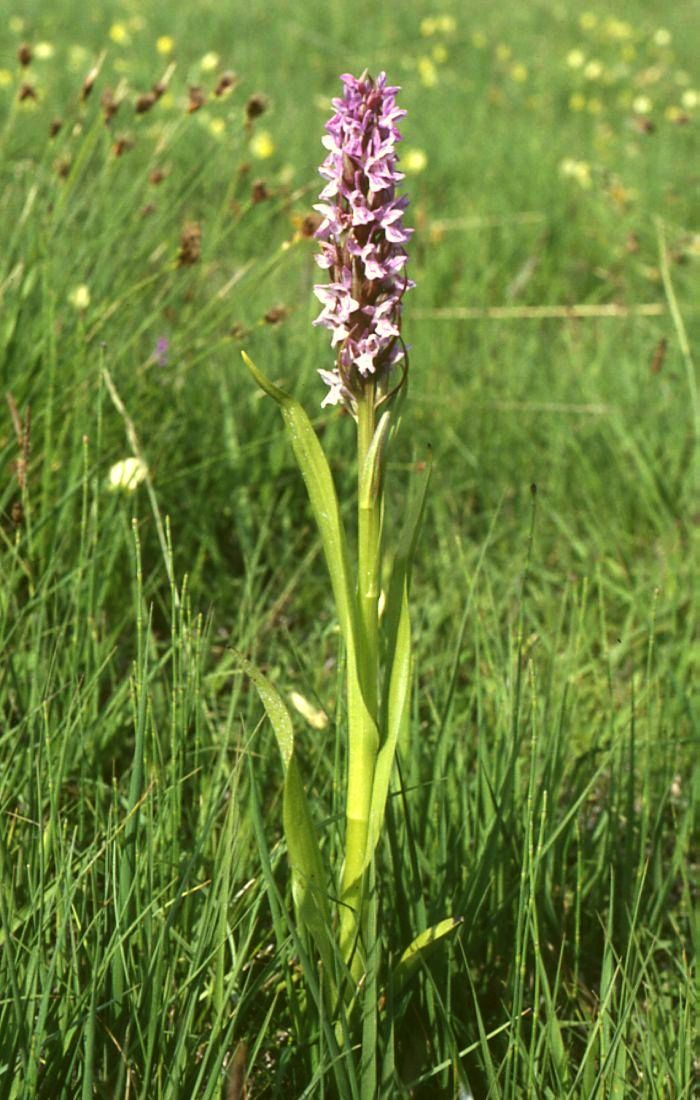 Fleischfarbenes Fingerknabenkraut (Dactylorhiza incarnata), Orchideen (Orchidaceae) - Österreich/Austria/Autriche: Burgenland, Seewinkel, W Illmitz